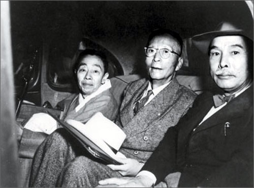 1947년 7월. 서재필 박사 귀국 모시는 김규식과 여운형.